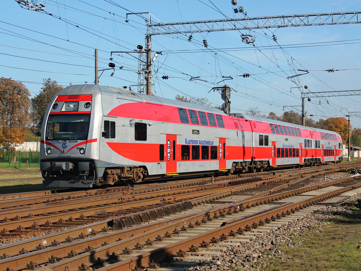 Электропоезд построен в трёхвагонной составности